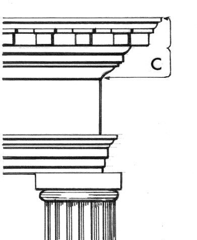 b/w line drawing of cornice . ATTENZIONE ! Questi sono un fregio ed una colonna di fantasia che non esistono nella realtà ! --DenghiùComm (talk) 19:01, 23 April 2015 (UTC)